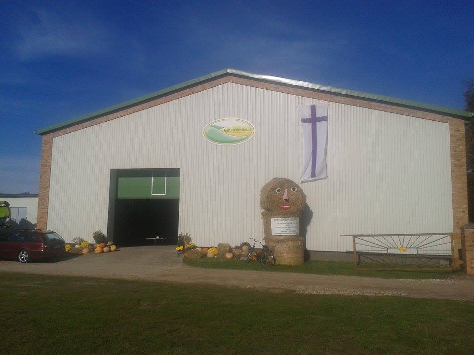 Festhalle des 25. Landeserntedankfestes MV 2015 in Semlow